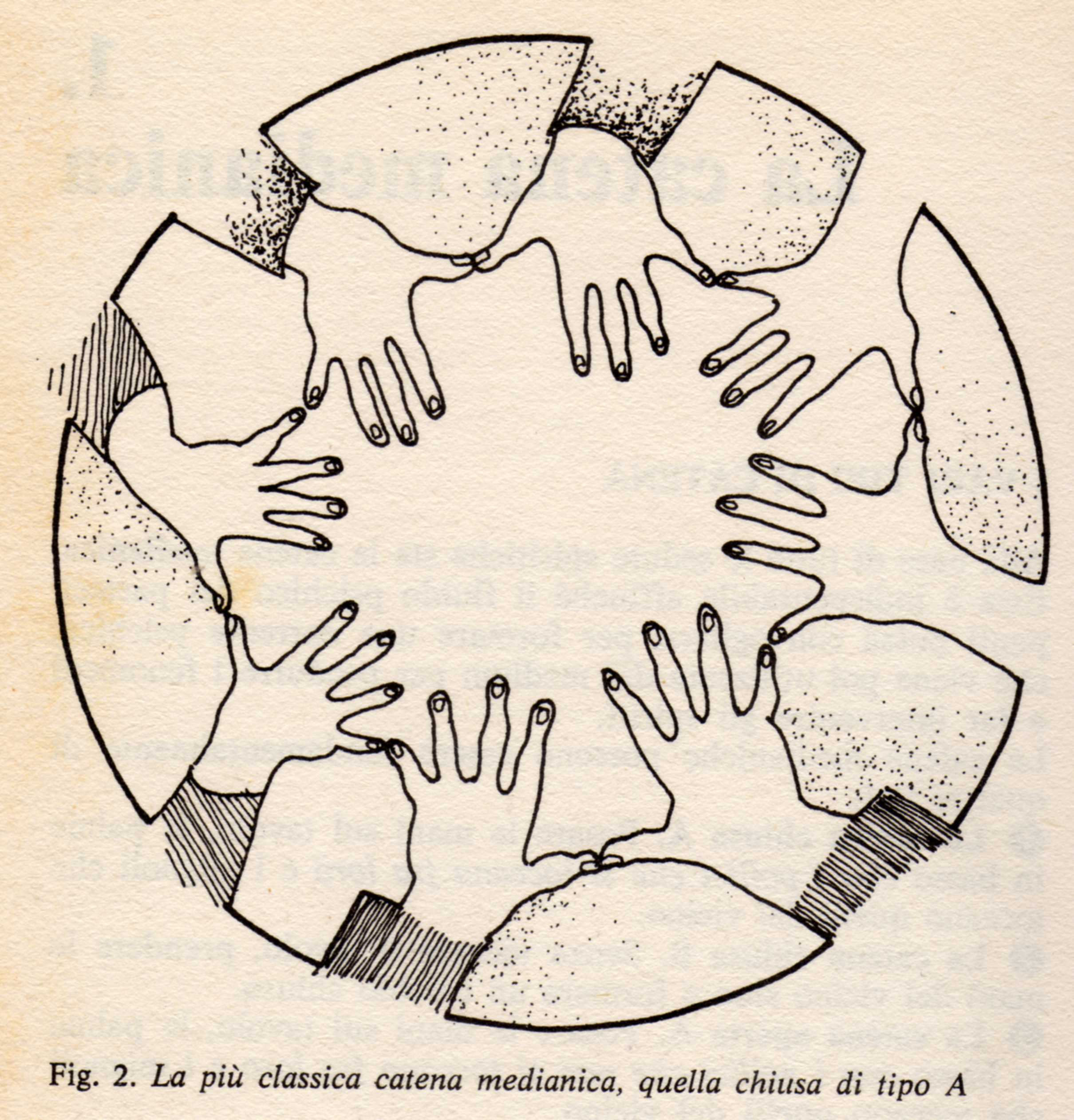 Catena medianica chiusa A